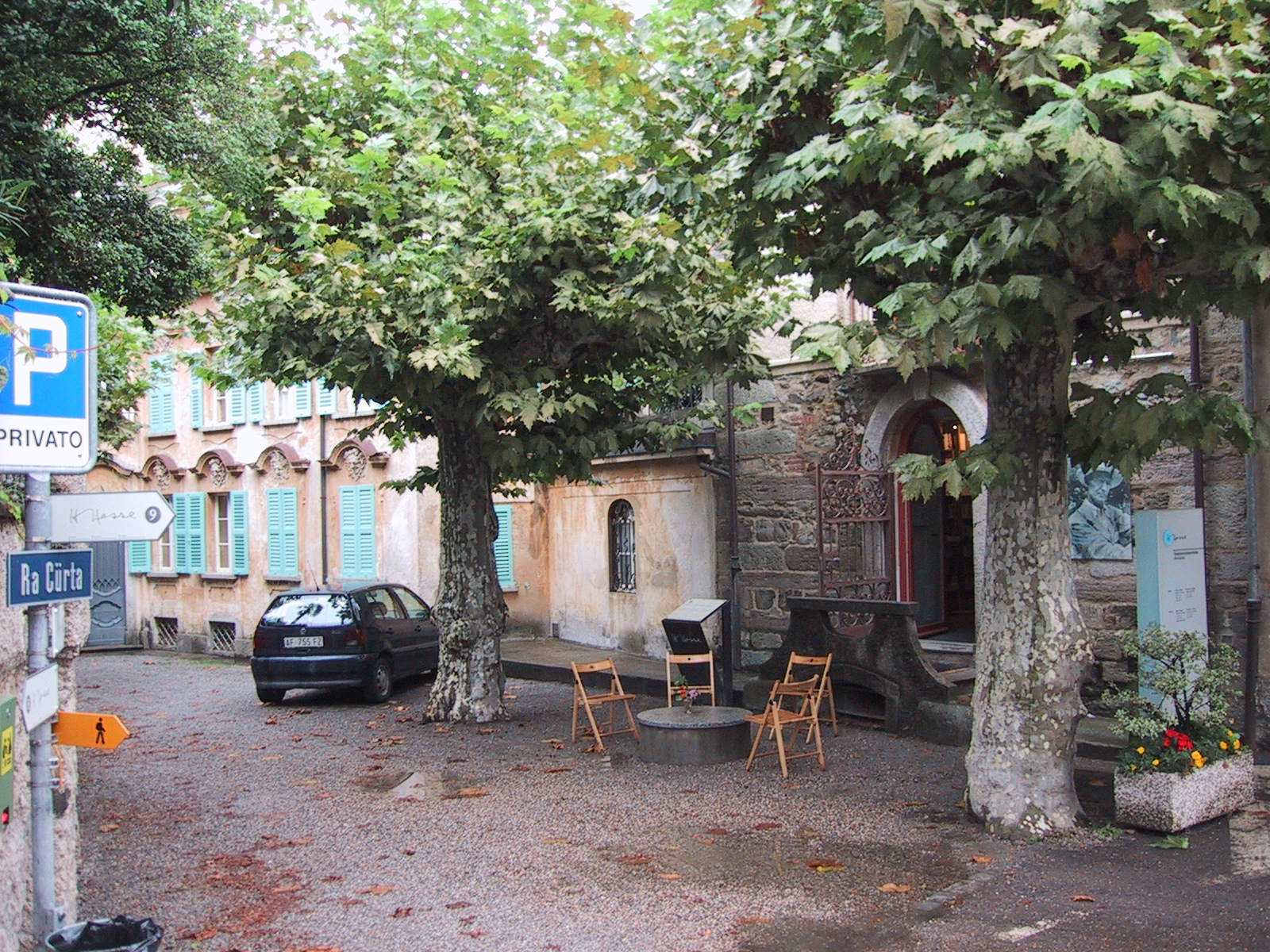 Eingang zum Hermann Hesse – Museum in Montagnola, Kanton Tessin